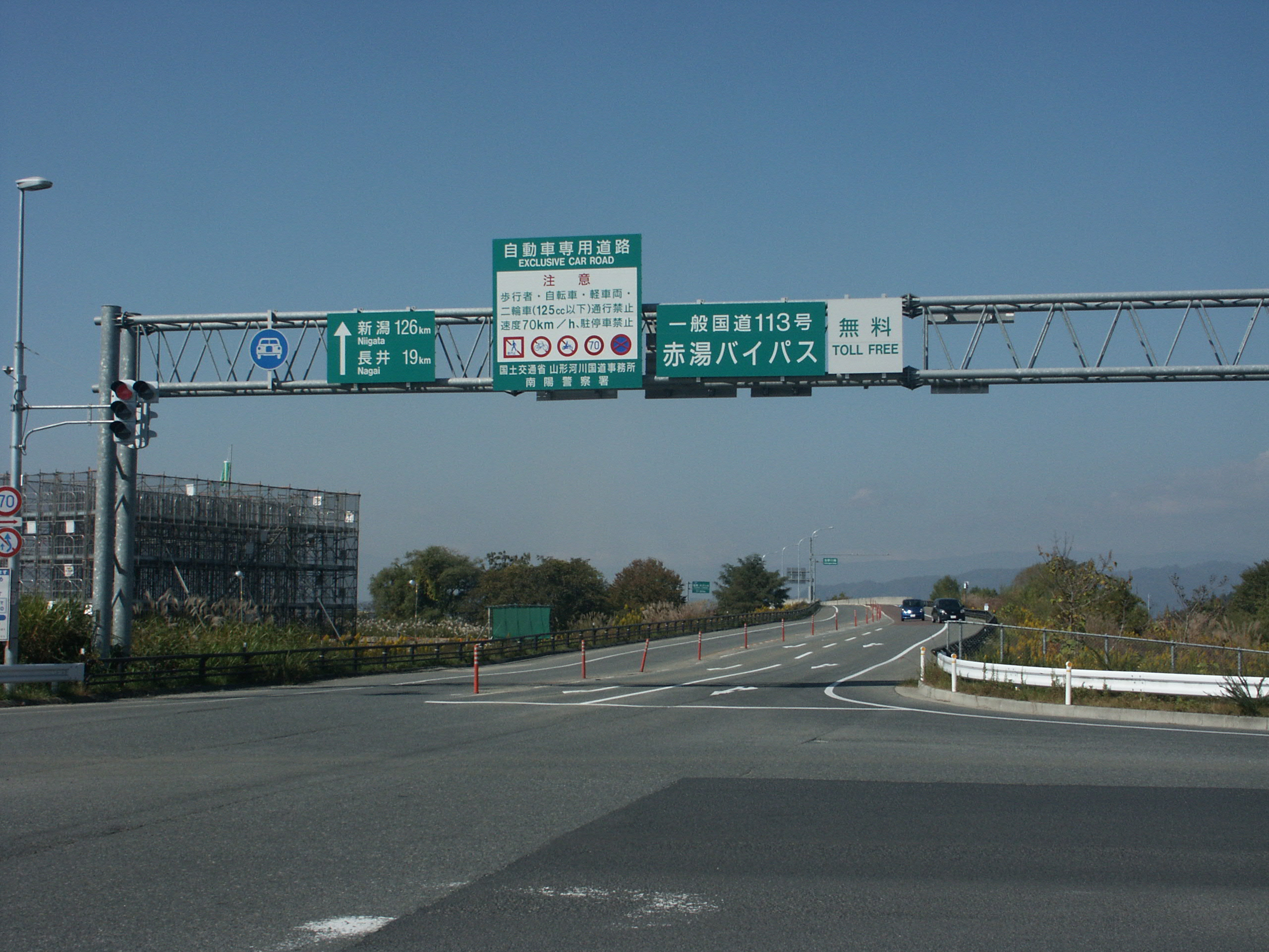 国道113号線赤湯バイパス山形県東置賜郡高畠町深沼交差点付近